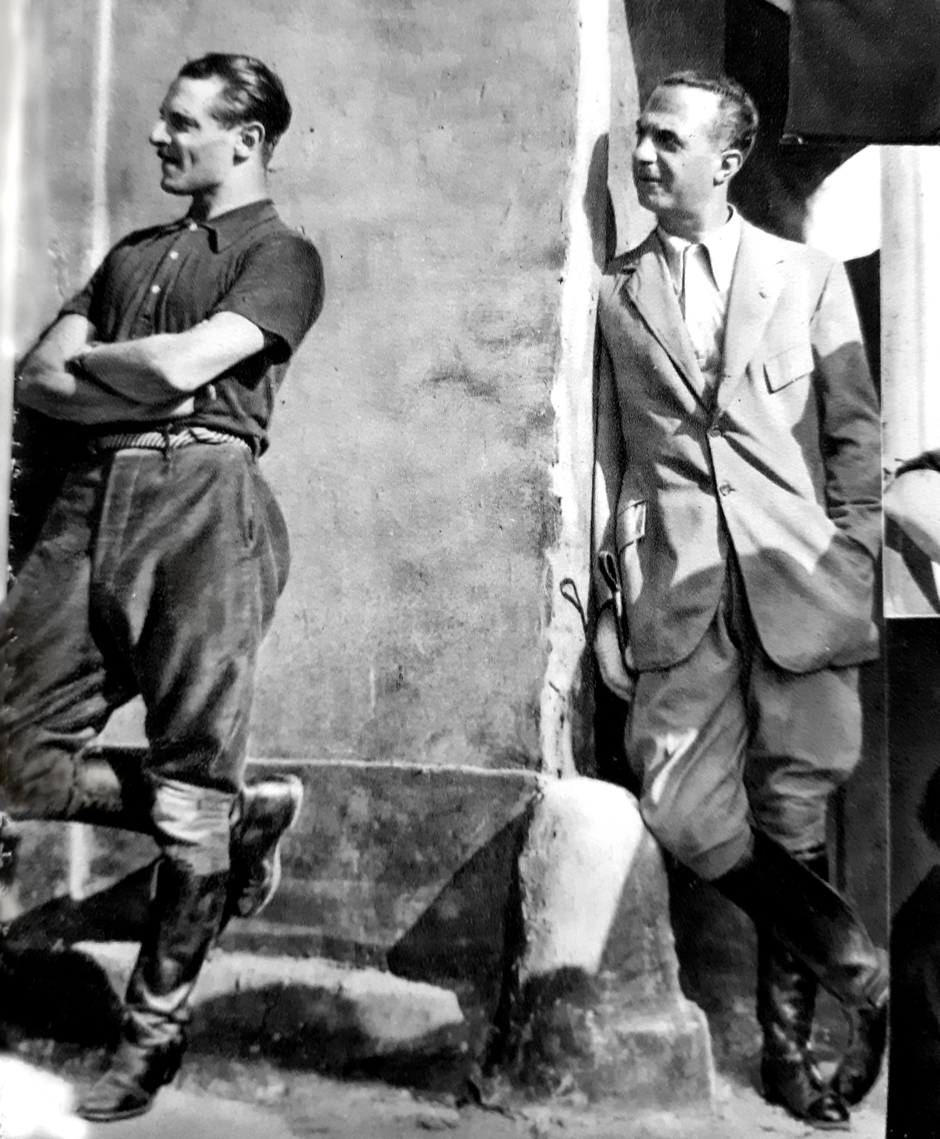 Alessandro Blasetti e Giuseppe Bottai, 1934